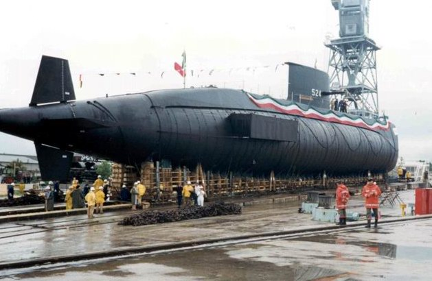 Il varo del sommergibile Longobardo a Monfalcone